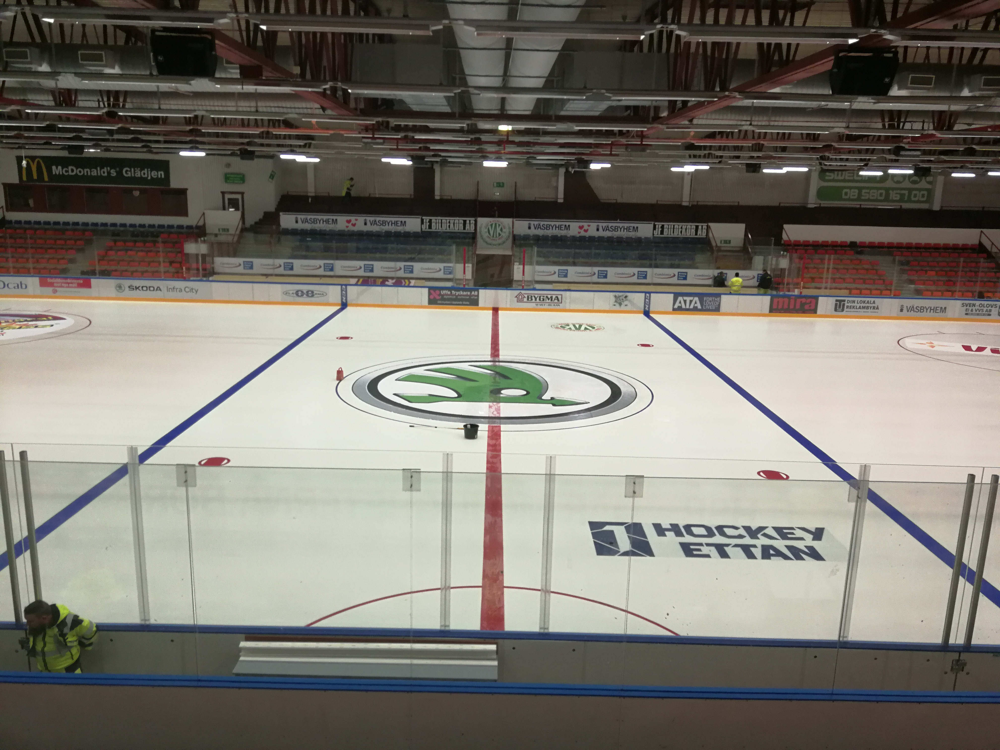 Vilundaparkens ishall invändigt